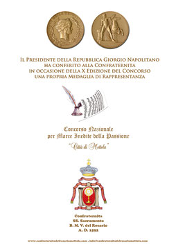 Medaglia di rappresentanza Rosario Mottola